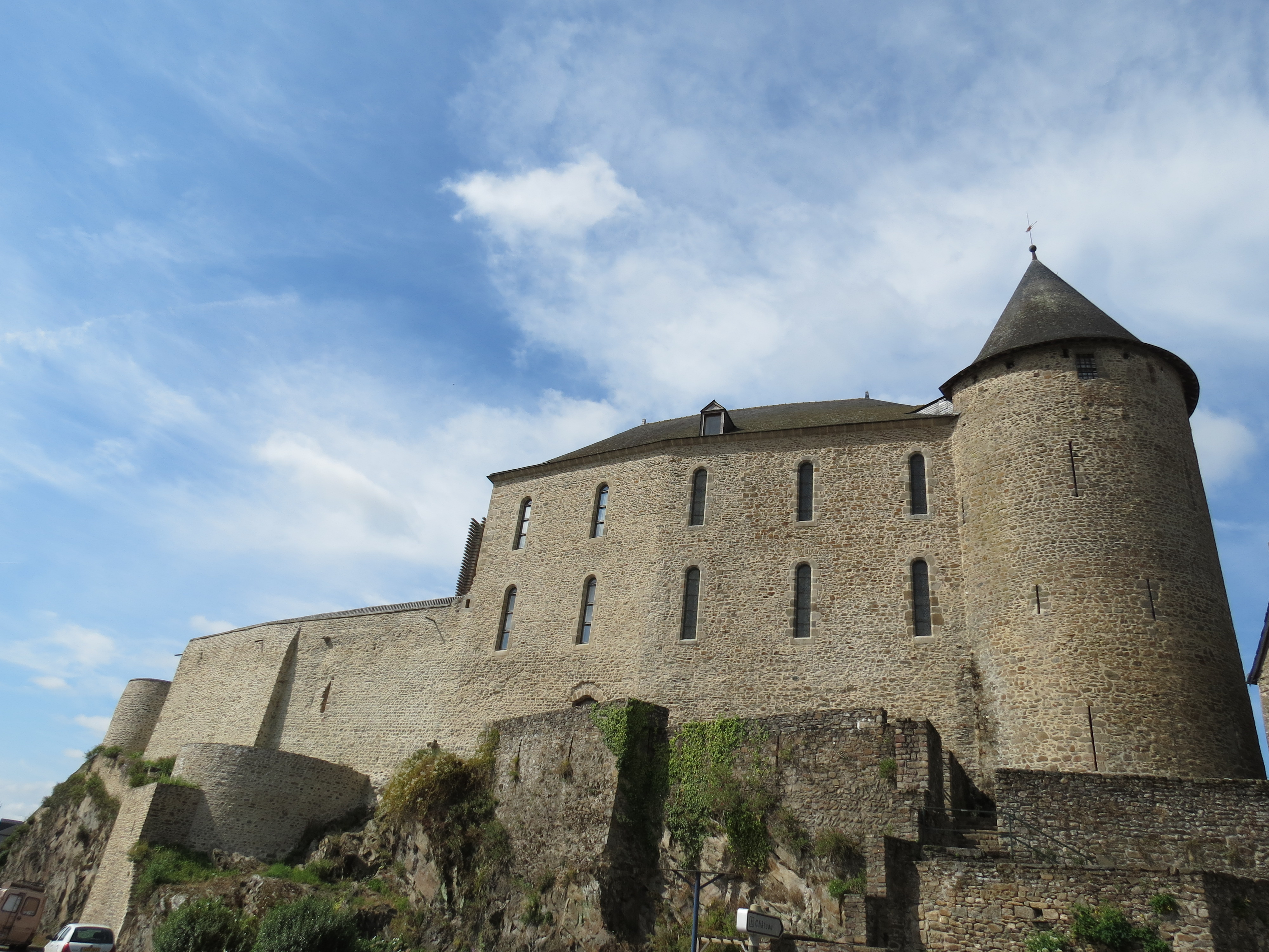 Palais carolingien du château de Mayenne, Pays de la Loire.